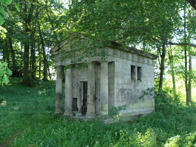 Klecewo - grobowiec von Rosenbergów